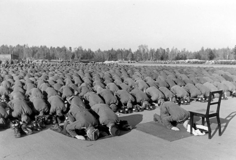 Neuhammer, Nov. 43 Bosnische Freiwillige in der Waffen-SS Bei der Gebetsübung. Prop- Kp.: SS-PK Film-Nr.: 52/43 Bildberichter: Falkowski